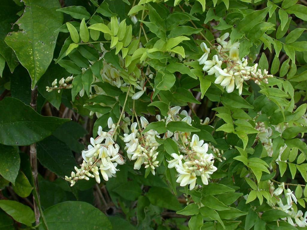 Millettia japonica：ナツフジ 2004/08/21 和歌山県田辺市：Tanabe City, Wakayama Pref. Japan